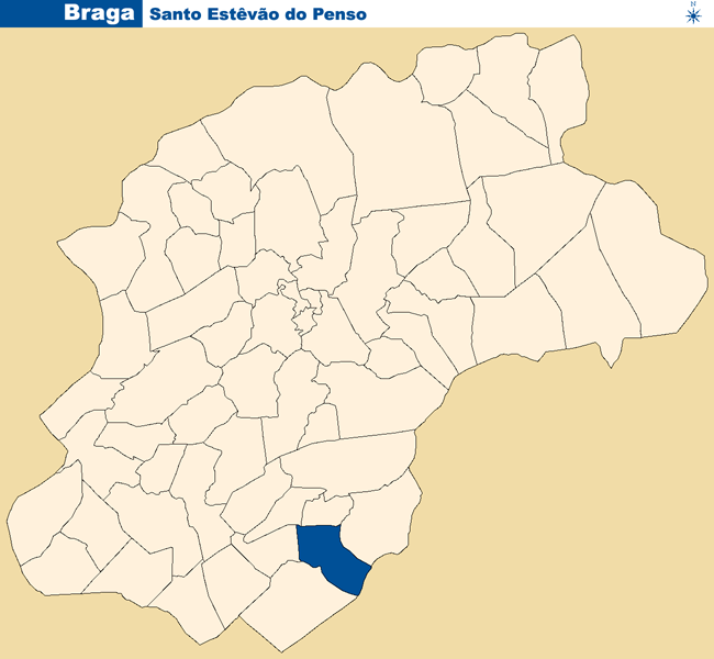 Localização de Santo Estêvão do Penso no concelho de Braga.